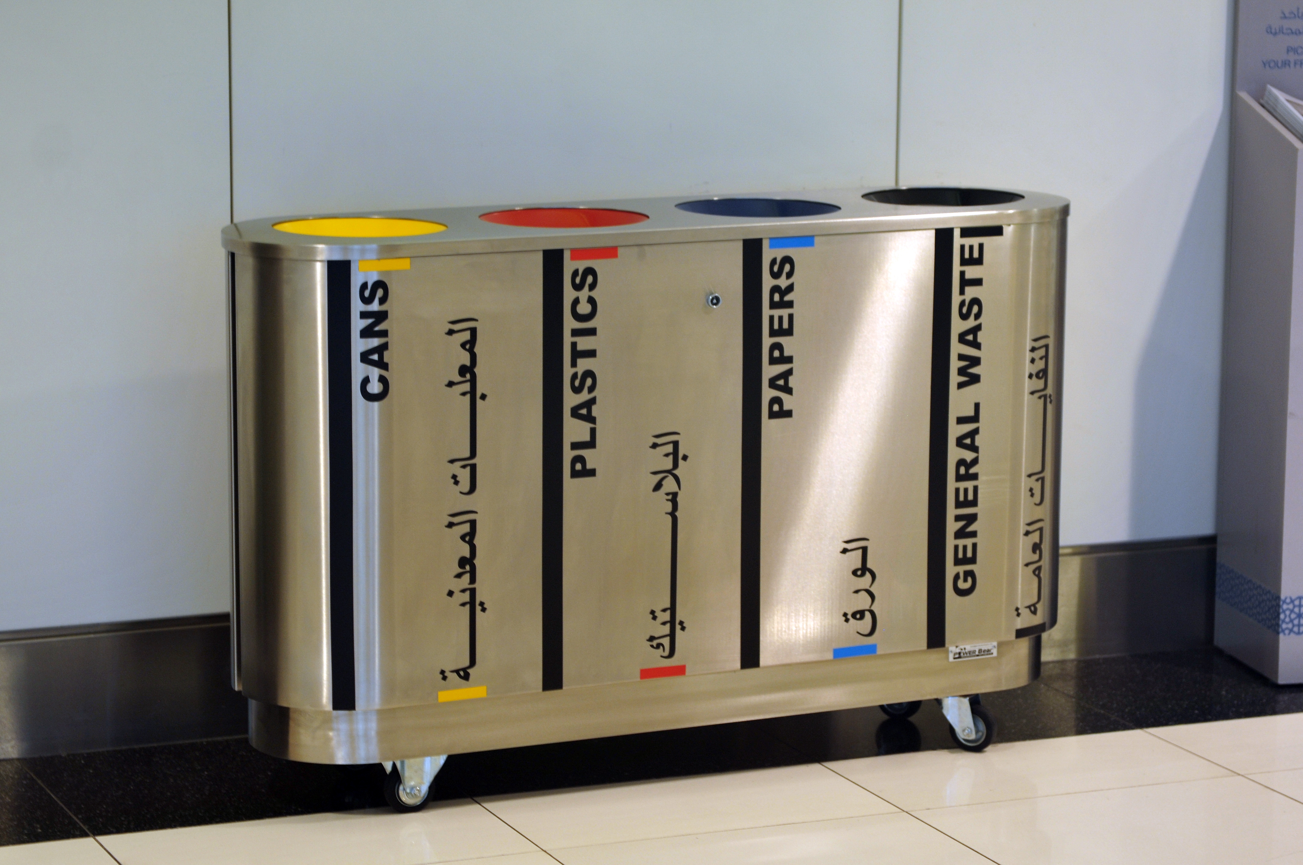 Wikimania 2013 Hongkong